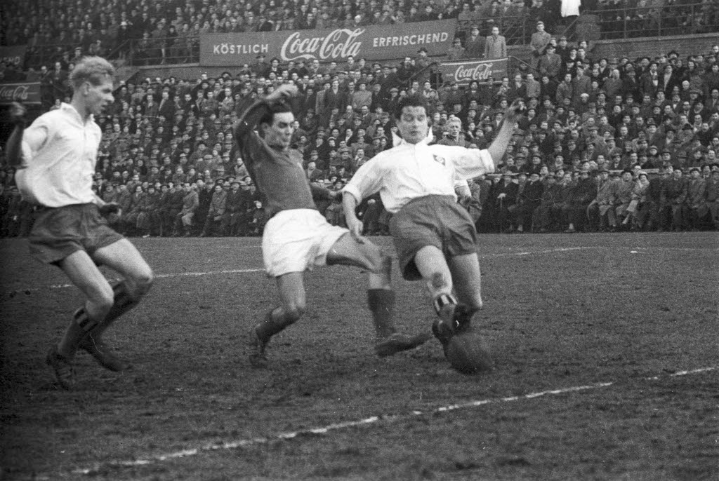 im Holsteinstadion vor 25.000 Zuschauern.